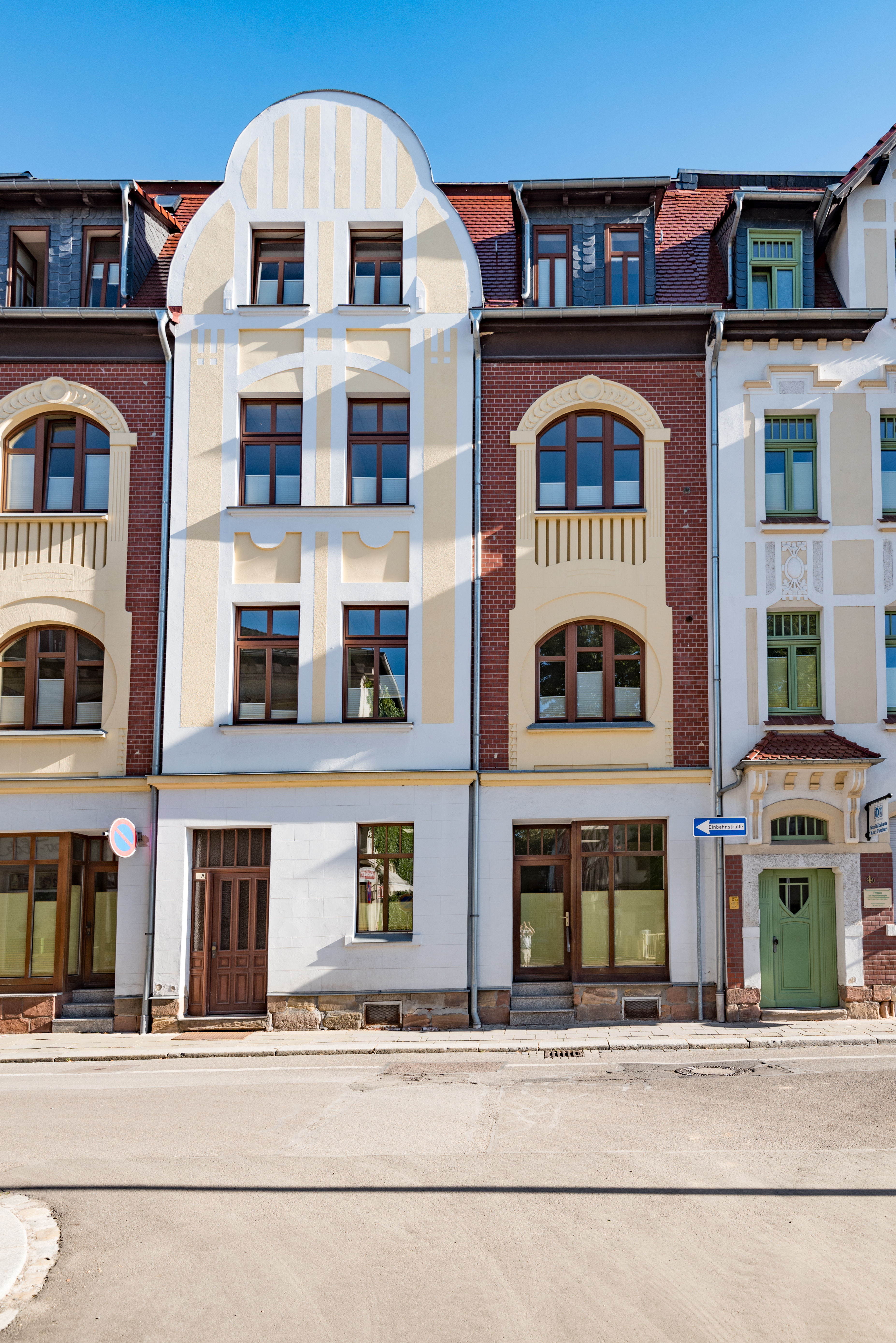 Weißenfels, Beuditzstraße 4a